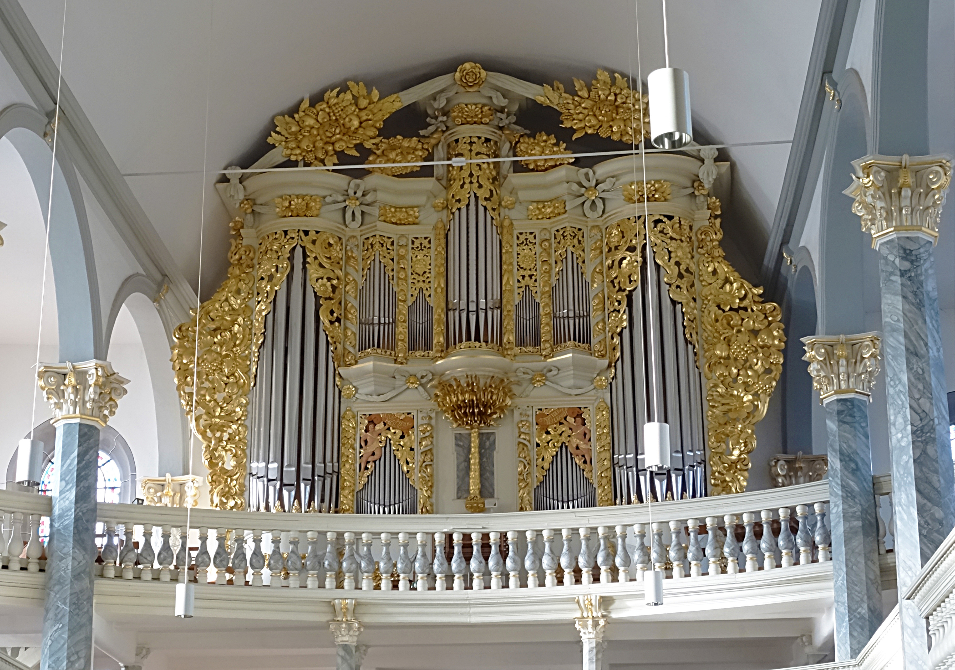 St. Trinitatis Sondershausen, neue Hey-Orgel (1997) im Prospekt von 1680